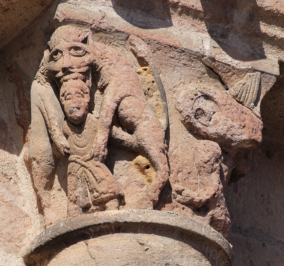 Lurcy Levis Eglise St Martin Chapiteau